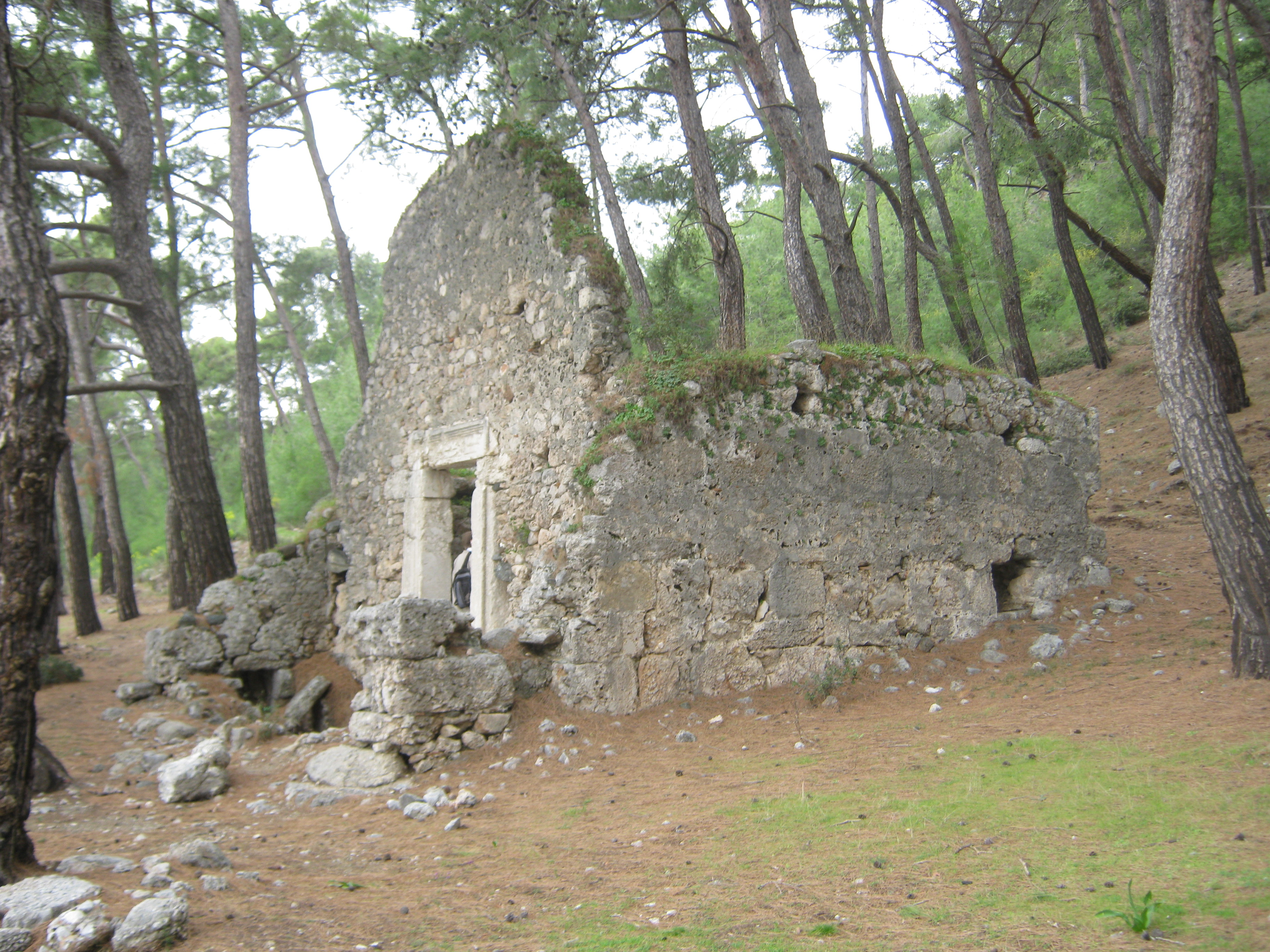 Фаселіс. Один з мавзолеїв в північній частині некрополю.